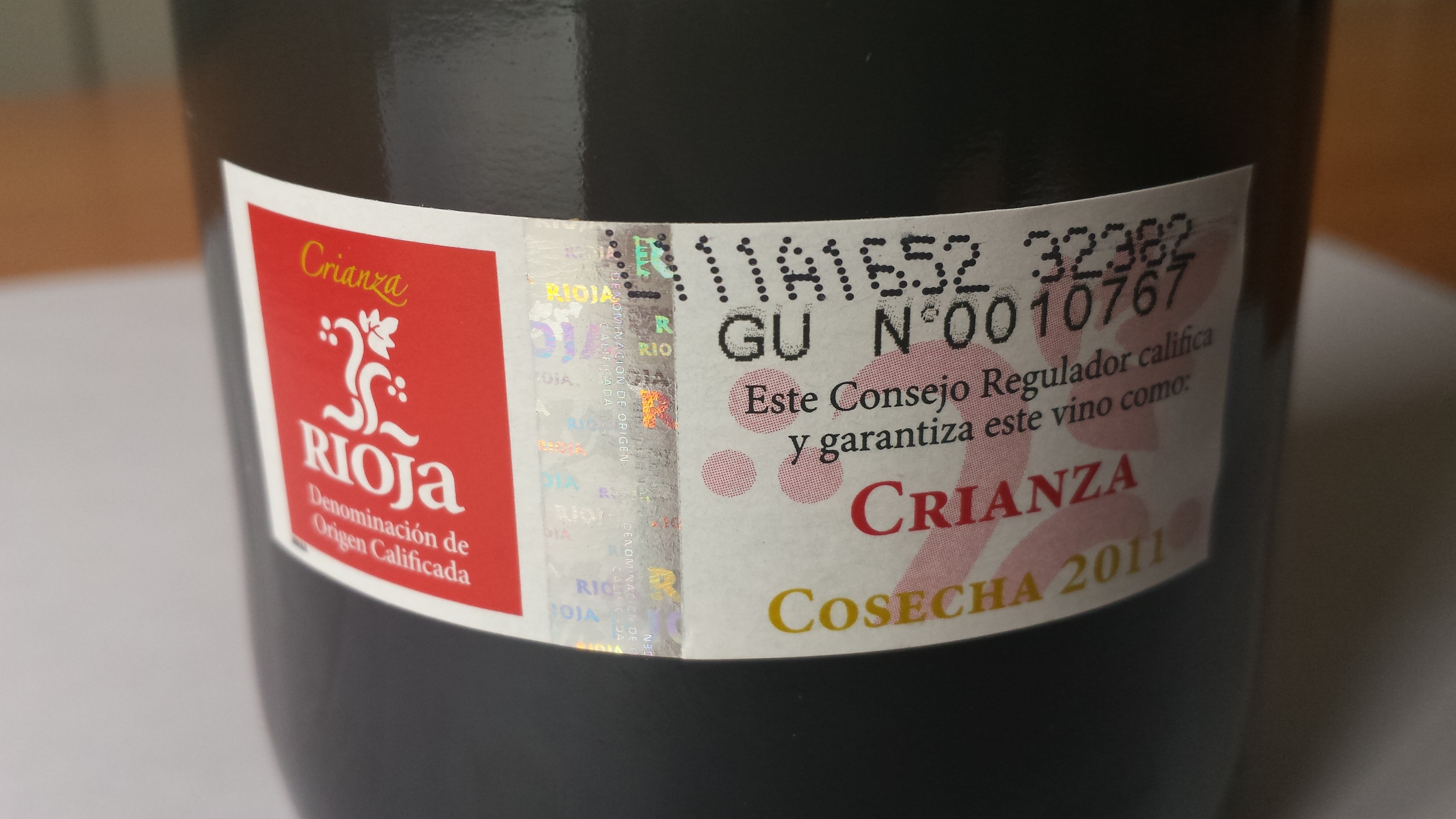 Etiqueta de la DOCa Rioja